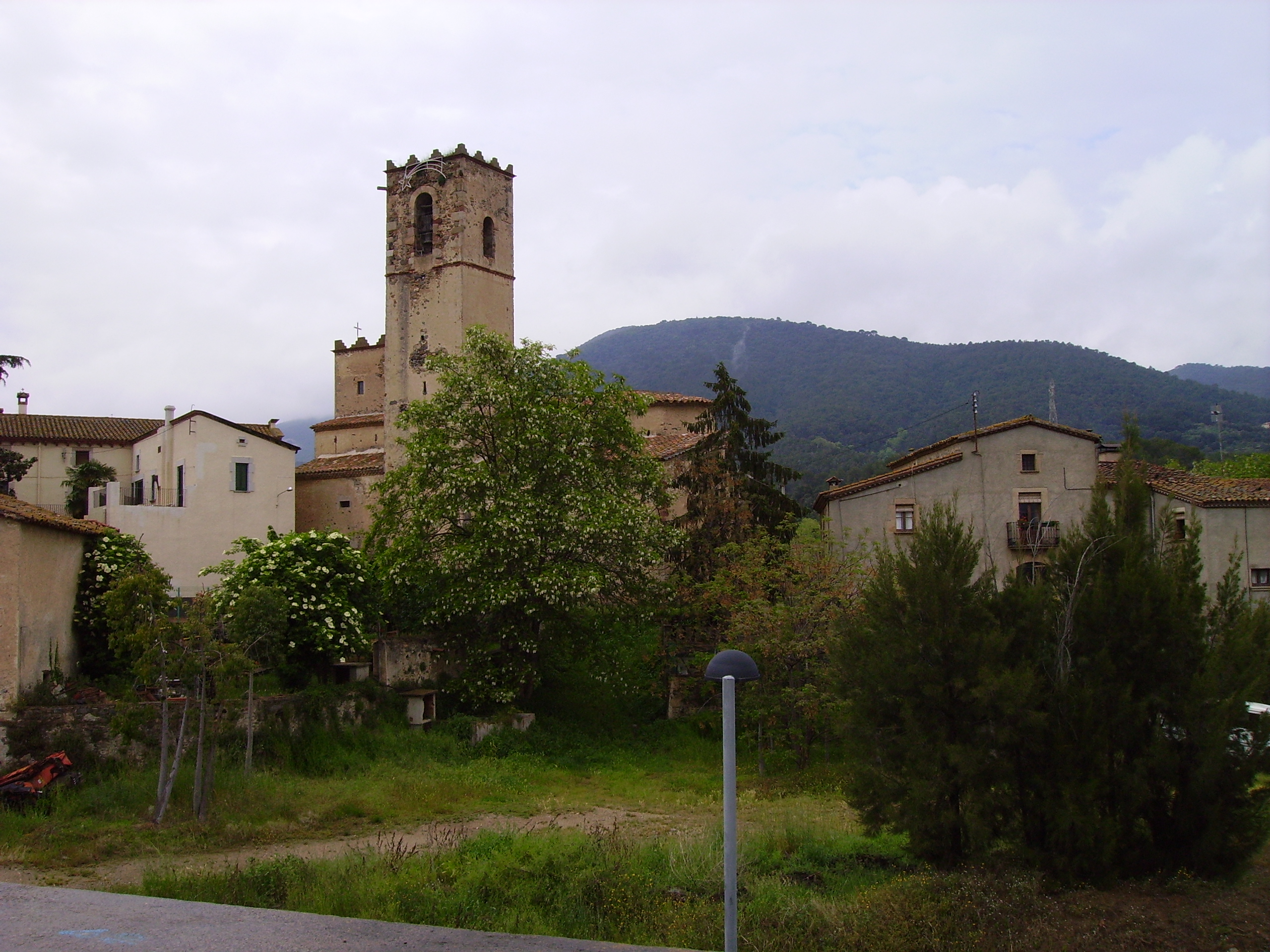 Imatge del municipi de Cànoves, Vallès Oriental,Catalunya, amb l'església de Sant Muç al centre de la imatge.